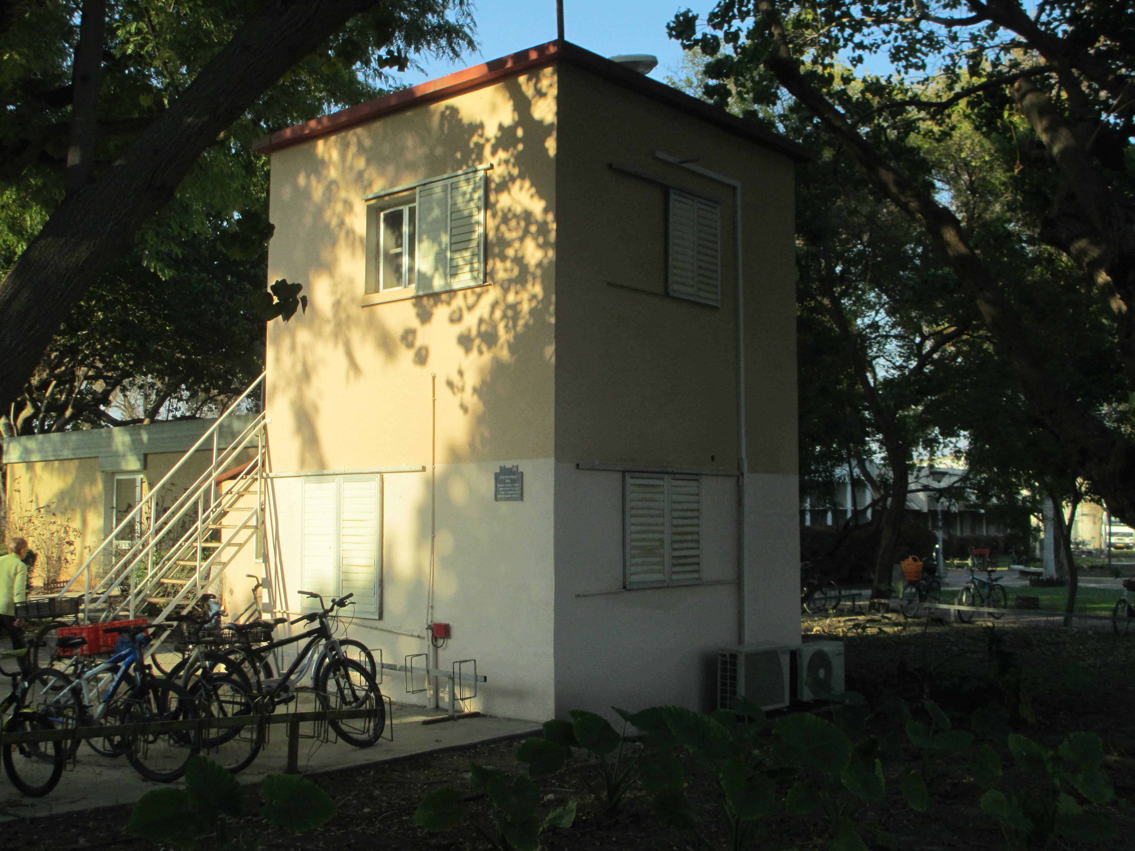 העמדה הדרומית בשדה אליהו